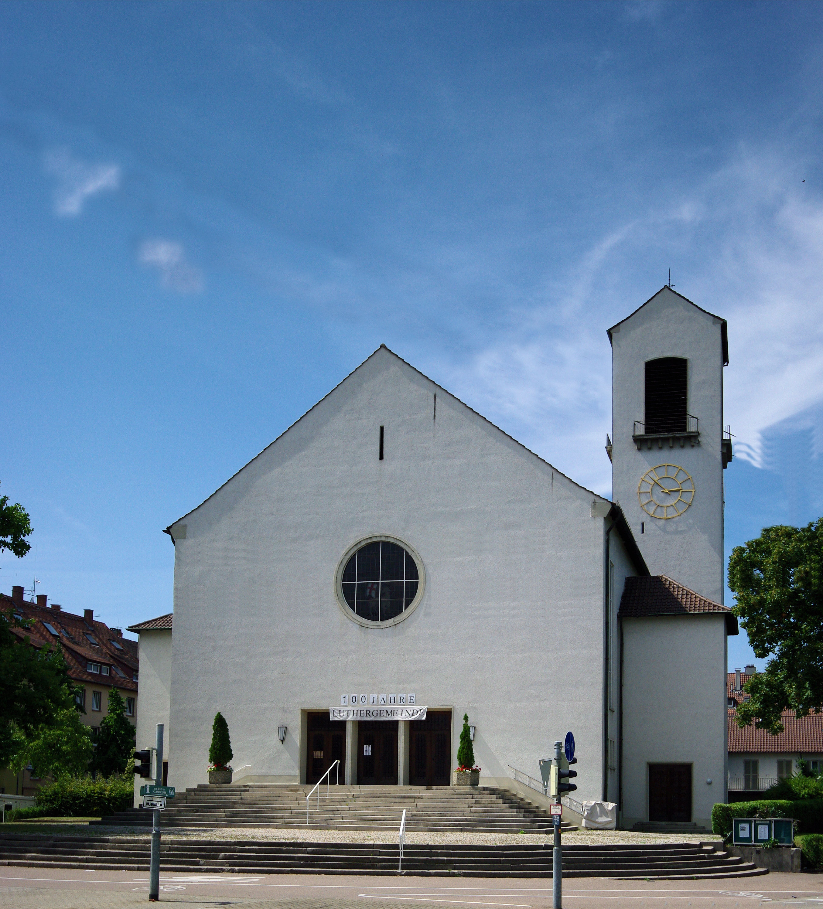 Lutherkirche